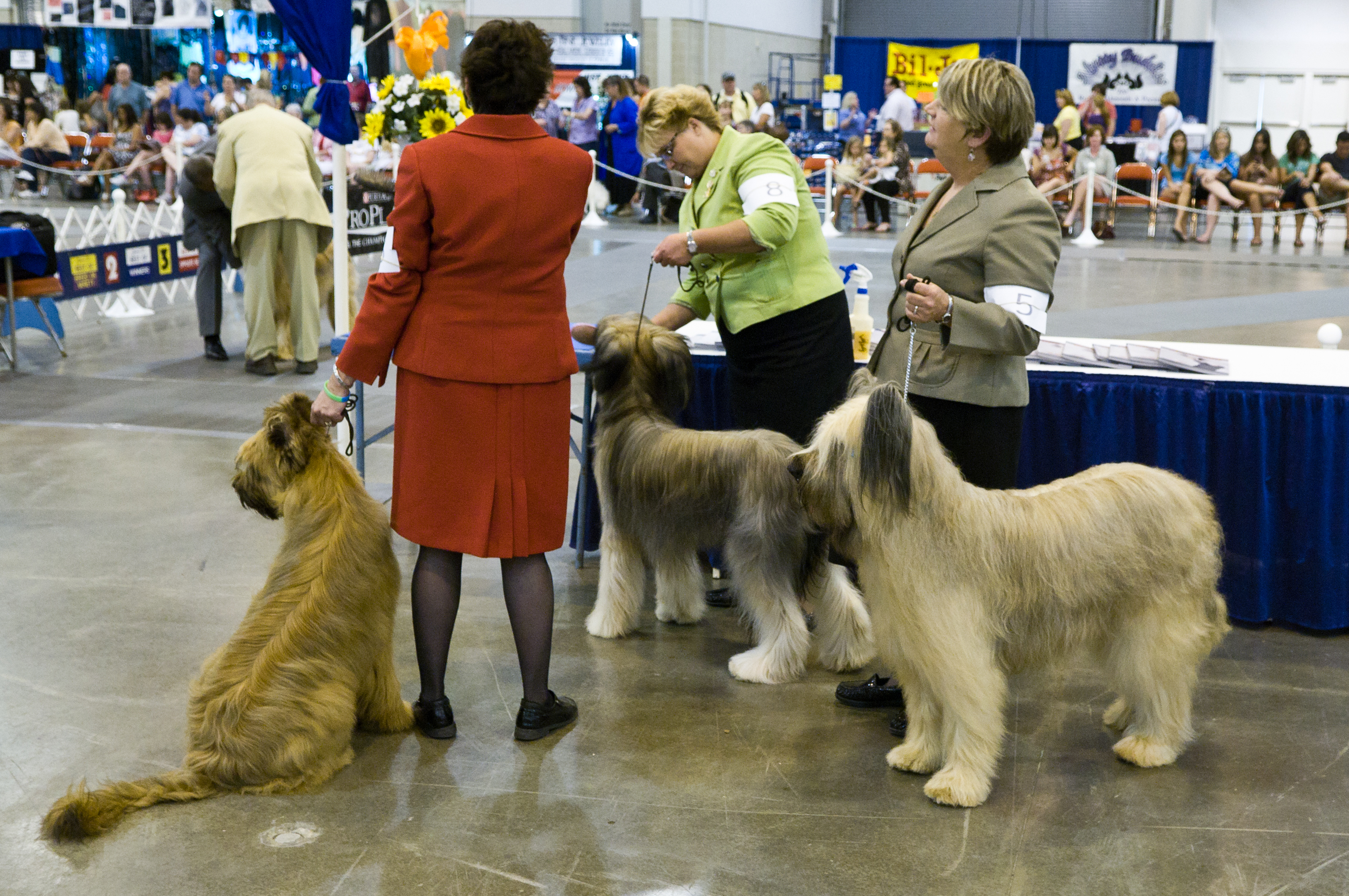 Briard dog group